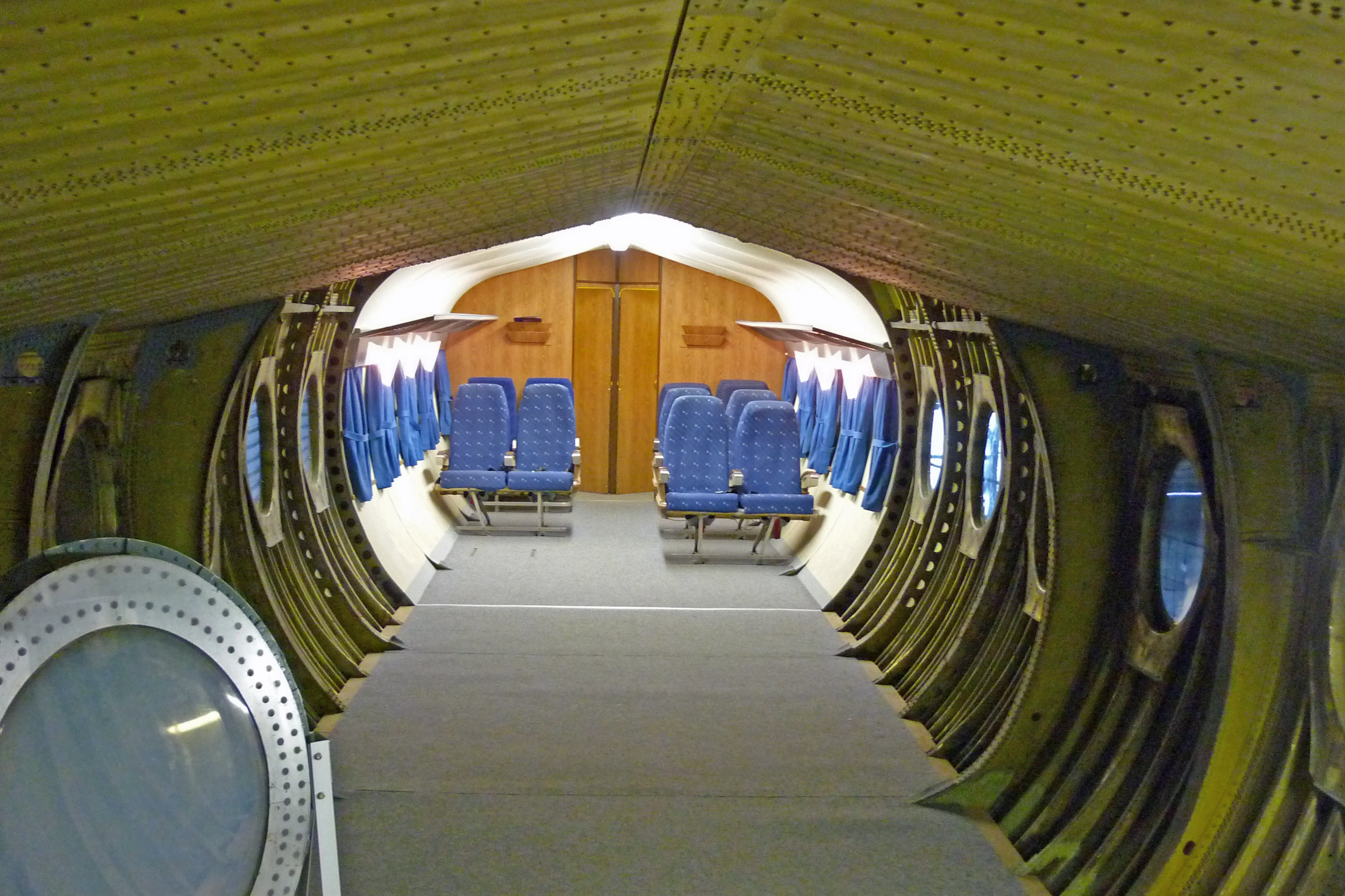 Der letzte noch vorhandene Flugzeugrumpf der "152" auf dem Flughafen in Dresden-Klotzsche, Nietkonstruktion des Fluggastinnenraums